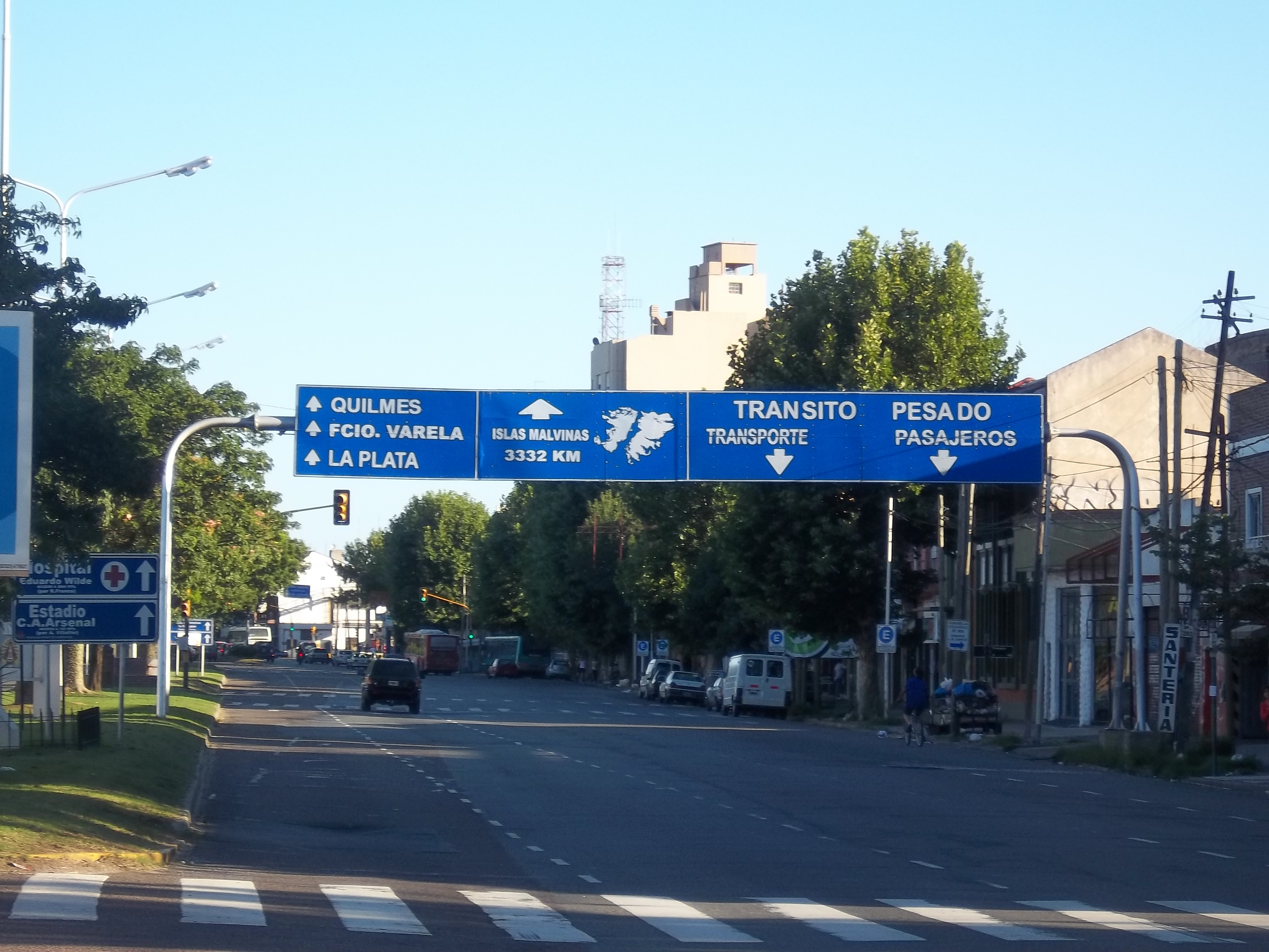 Avenida Presidente Mitre junto a la estación Sarandí del Ferrocarril General Roca en Sarandí, partido de Avellaneda, provincia de Buenos Aires, Argentina.